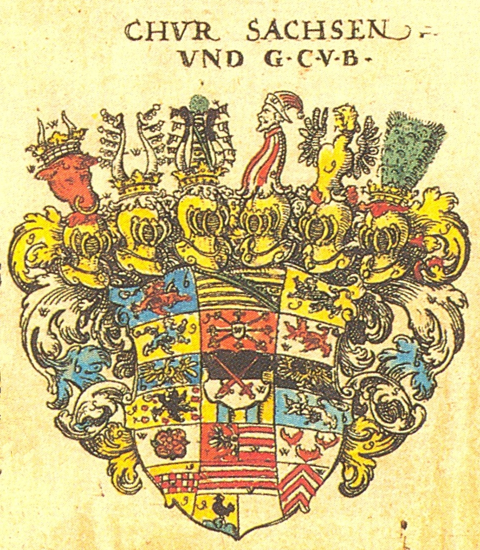 Siebmachers Wappenbuch, Blatt 3, Kurfürstentum Sachsen, 1605